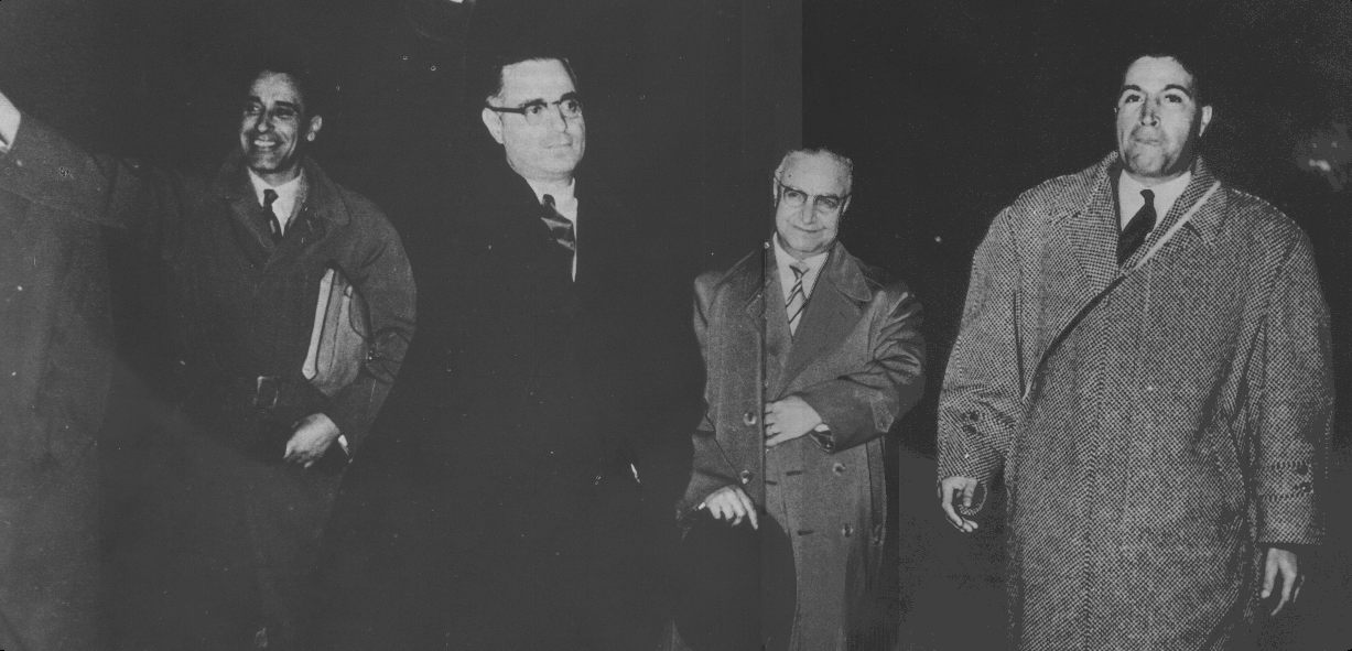 Tanger - 22 novembre 1955 le retour (De gauche à droite : Bouabid, Balafrej, Abdeljalil, Benjelloun rentrent d'exil en novembre 1955.)